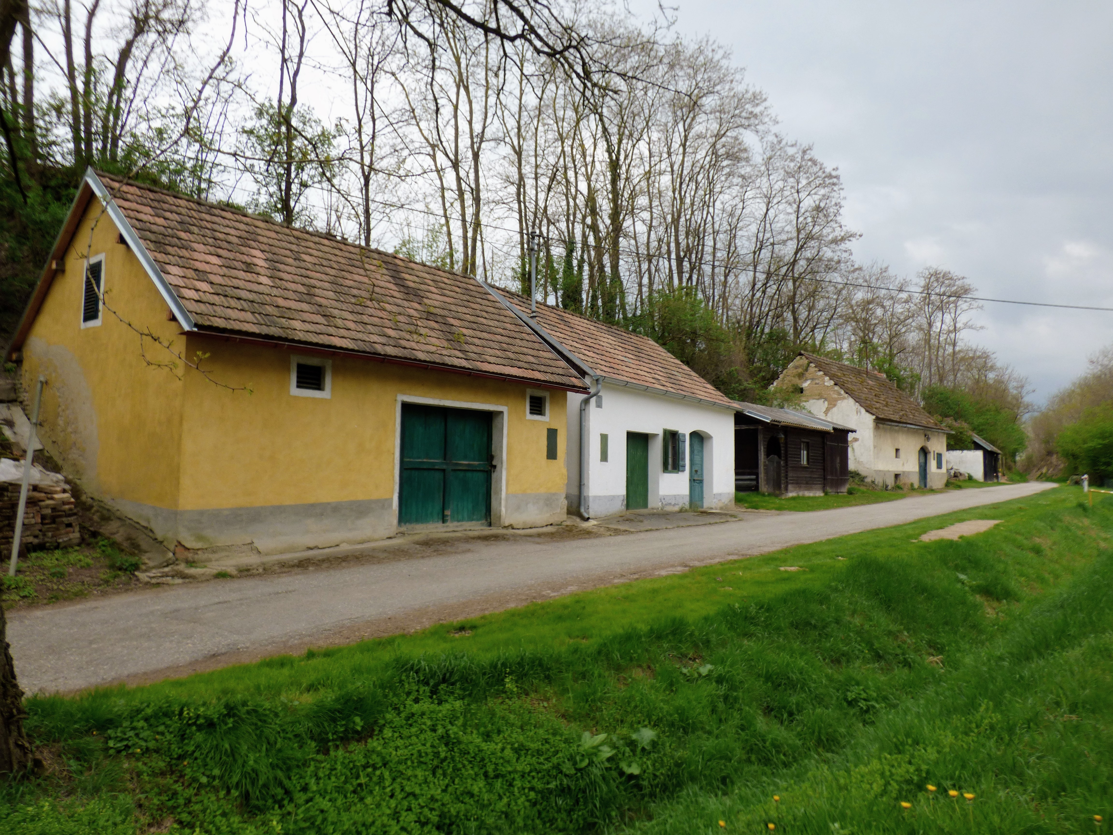 Kellergasse am nordwestlichen Ortsrand von Engelmannsbrunn (Gemeinde Kirchberg am Wagram, Niederösterreich)